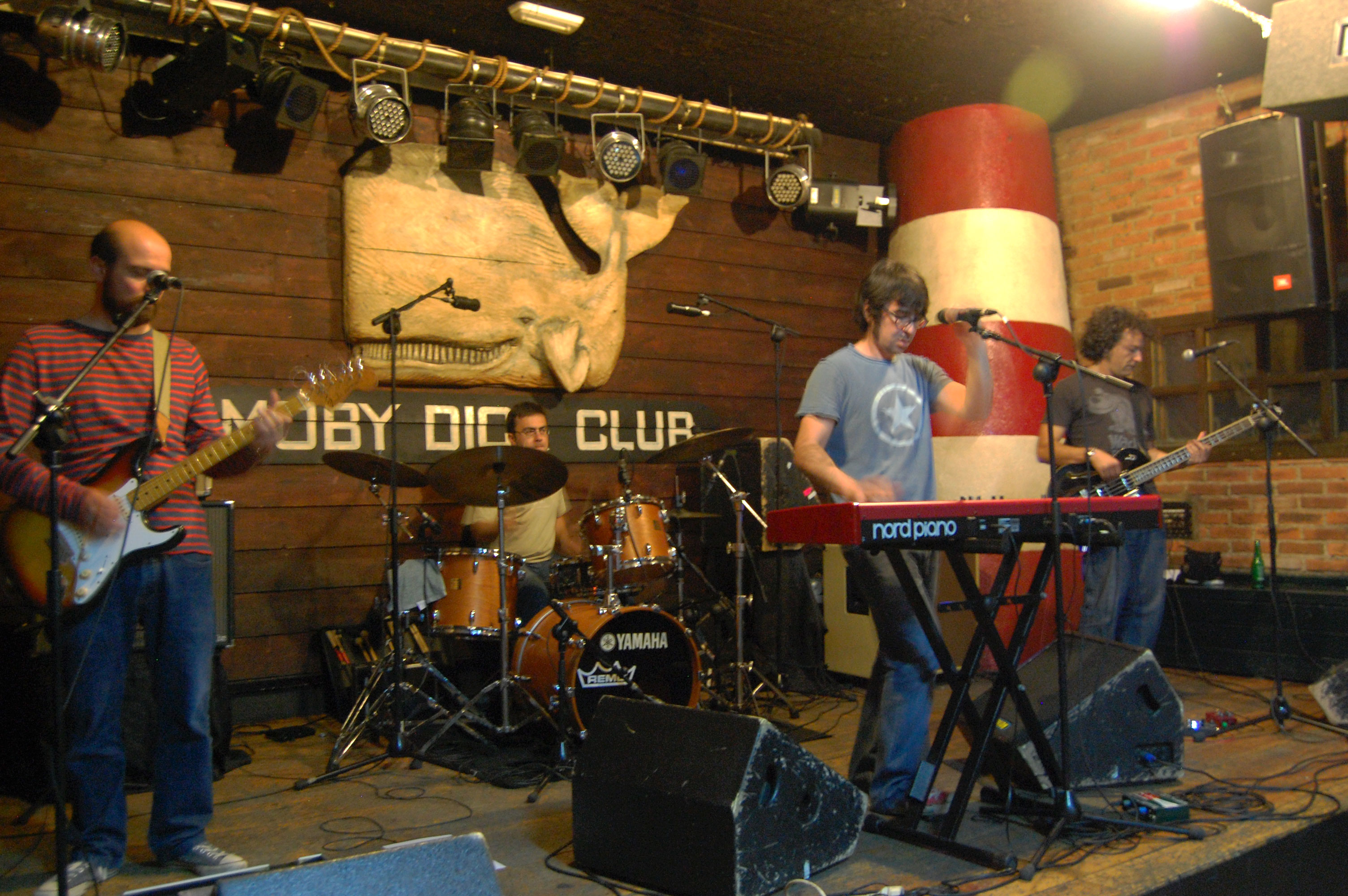 Señor Mostaza en directo